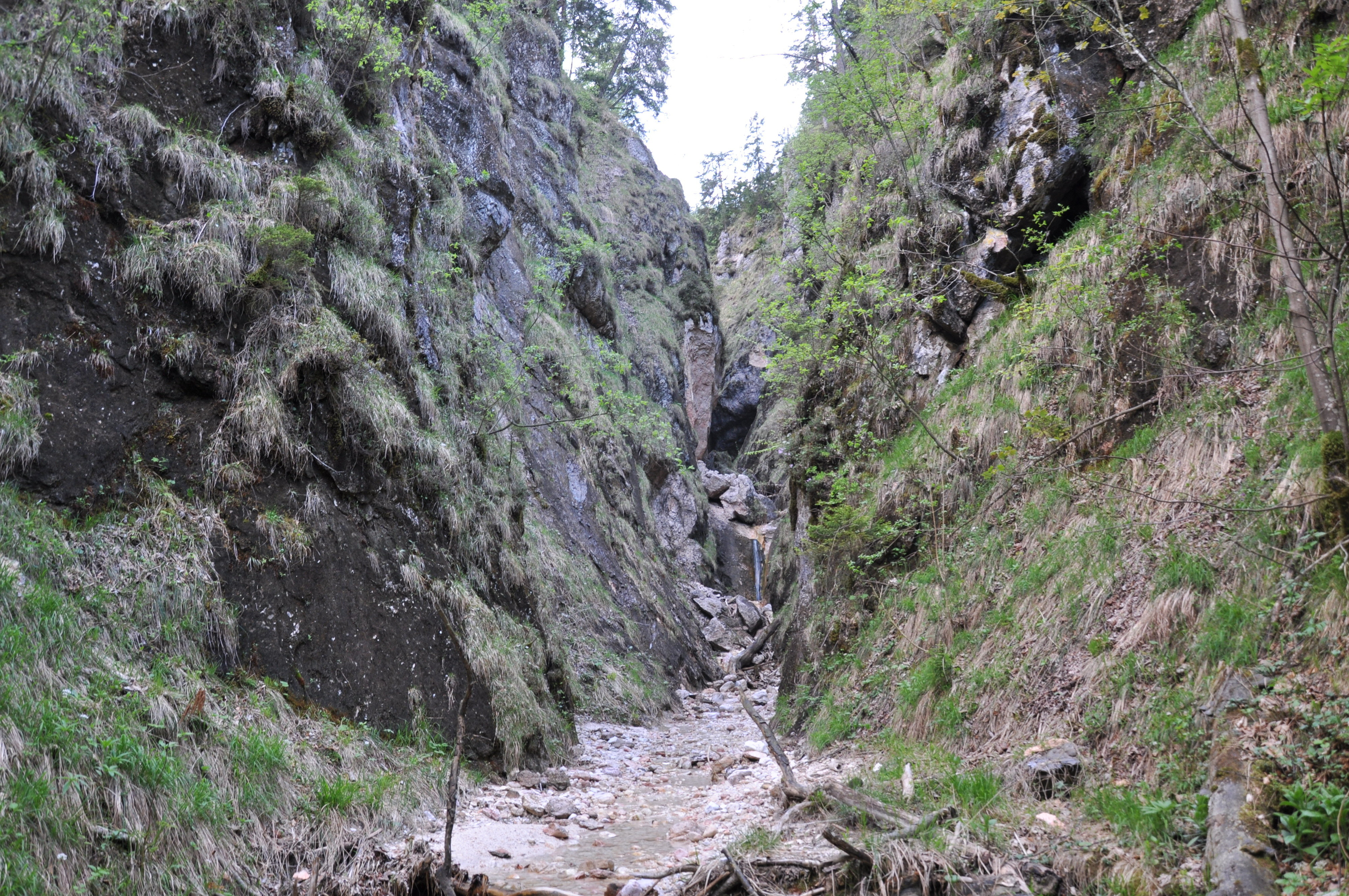 Geotop "Löwenschlucht SW von Schaffelpoint" (172R003 ) im Rötelbach in Bayerisch Gmain.